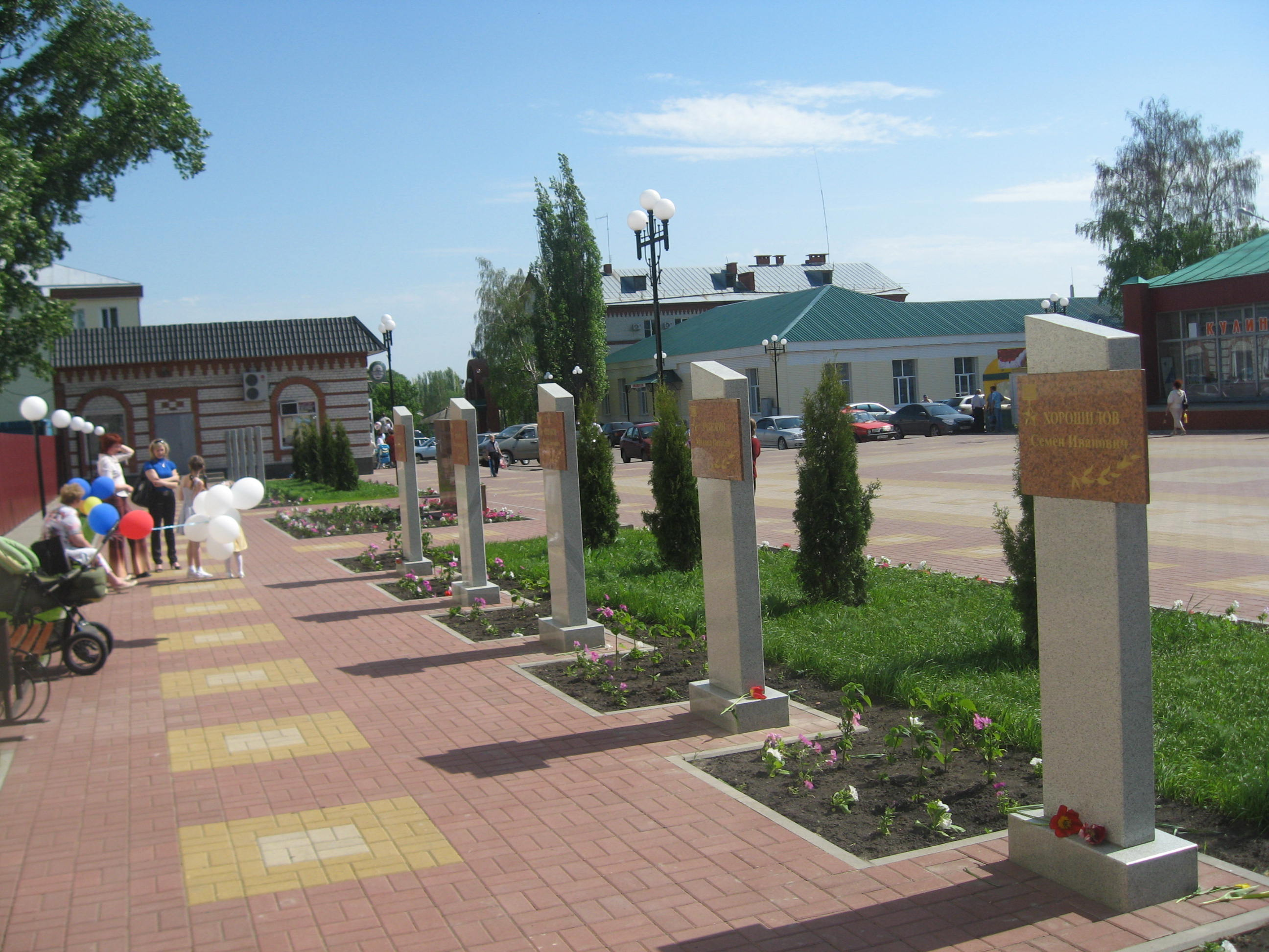 Видна аллея.